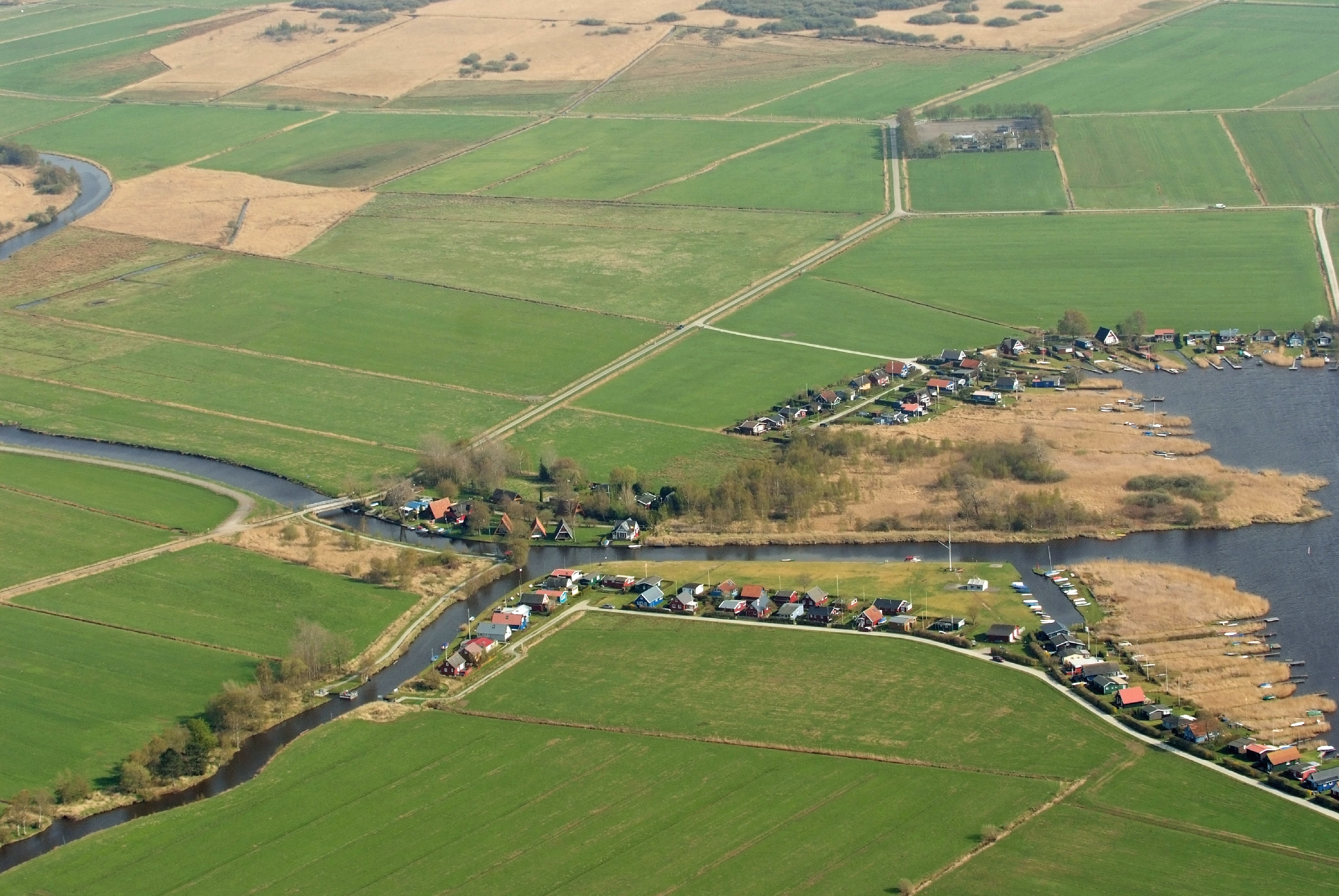 Blick auf den Heikesschloot und das davon abzweigende Hannewarkstief (nach links unten führend). Der Heikesschloot verbindet das Kleine Meer in der Gemeinde Hinte und das Große Meer in der Gemeinde Südbrookmerland (Hintergrund). Die Wochenendehäuser links des Heikesschloots liegen auf Hinteraner, diejenigen rechts des Kanals auf Südbrookmerlander Gebiet. Am rechten Bildrand das Kleine Meer.